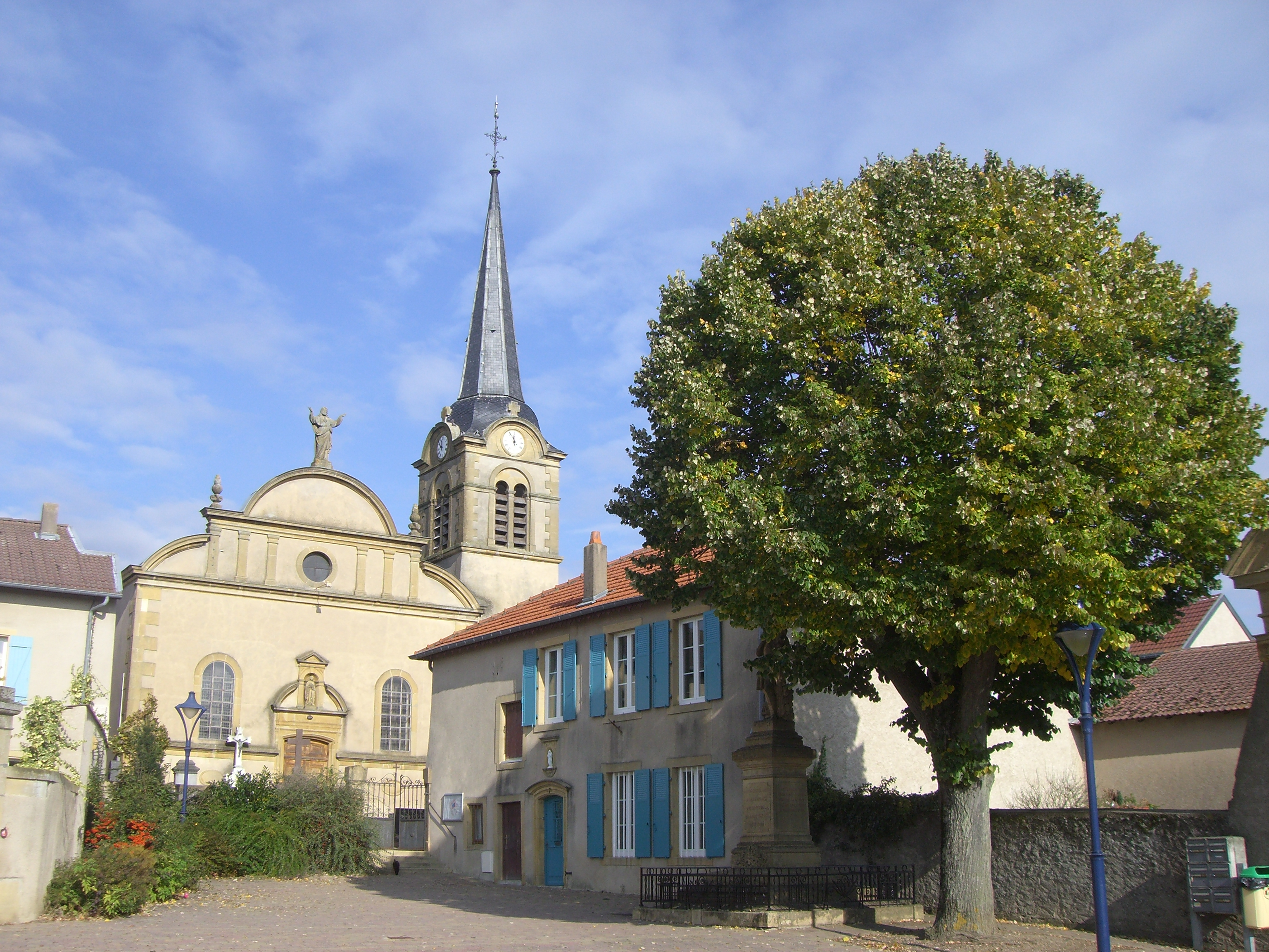 Eglise Marie Madeleine de Courcelles sur Nied